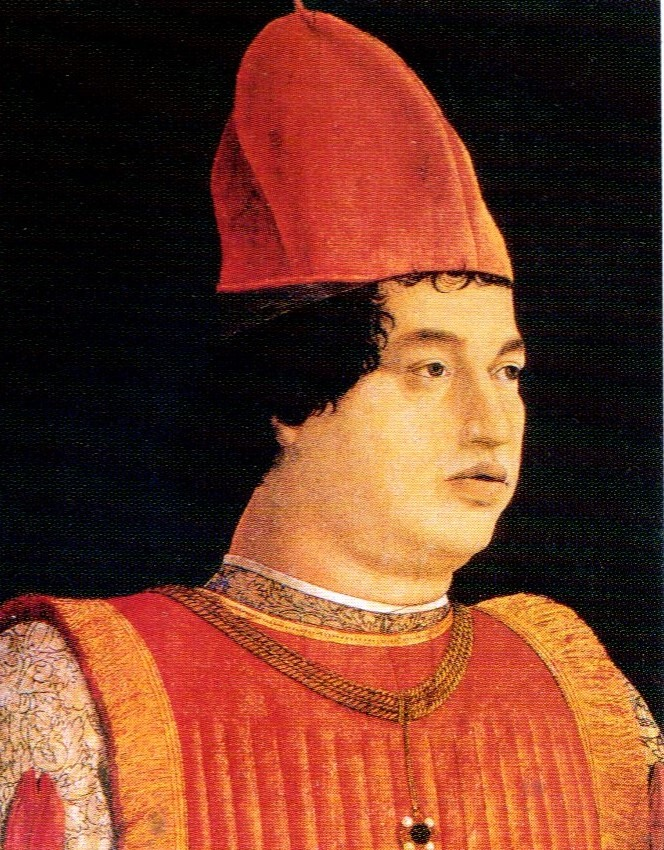 Ritratto del Marchese Gianfrancesco Gonzaga Conte di Rodigo e Signore di Gazzuolo e Belforte